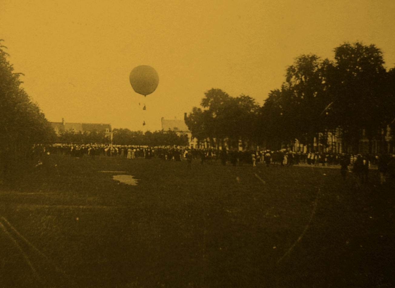 L'envol du ballon à gaz lors de la Ducasse d'Ath 1889